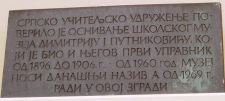 Душан Ј. Басић: Спомен плоча на згради Педагошког музеја у Београду посвећана оснивачу музеја Д.Ј.Путниковићу